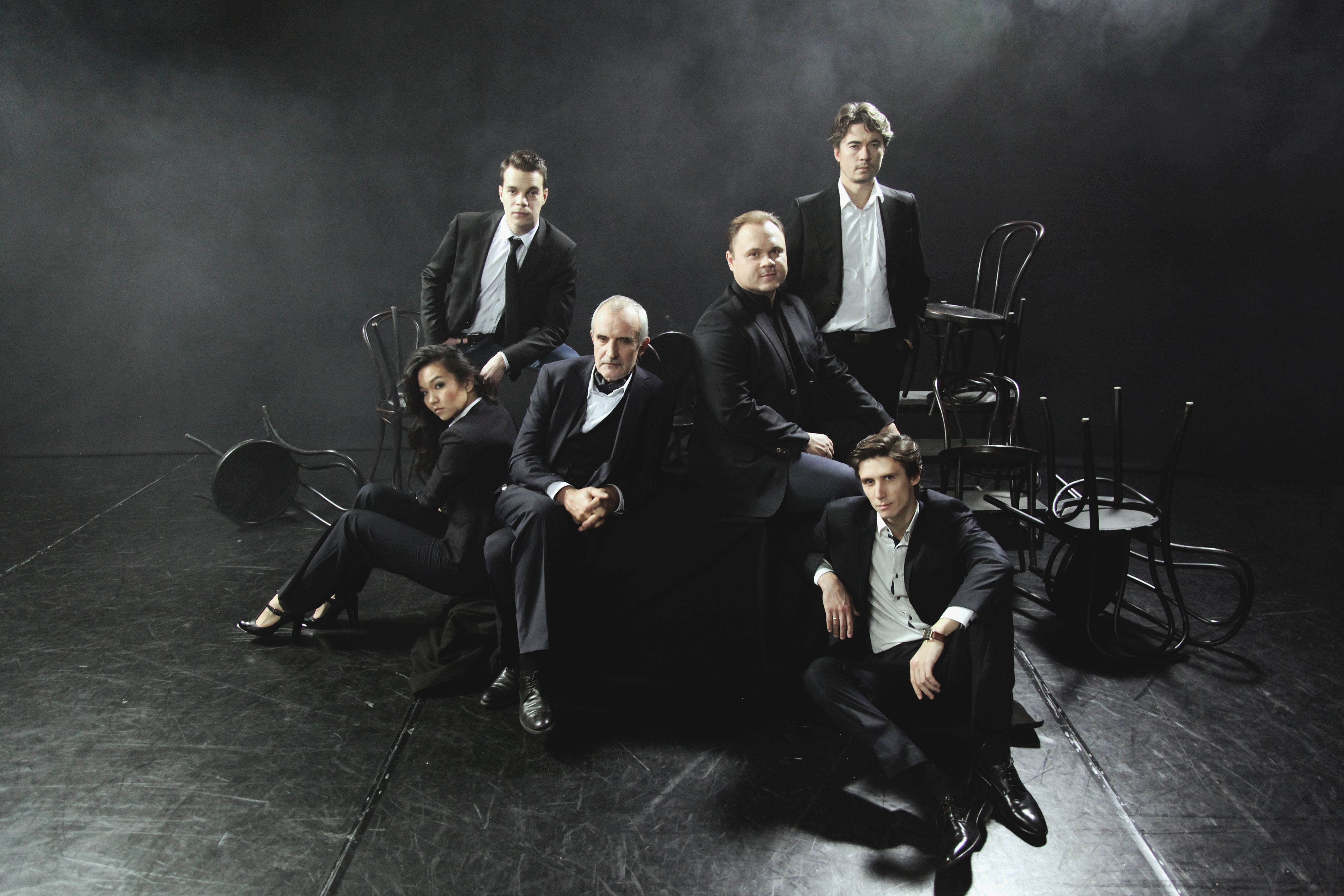 Режиссёрская лаборатория Римаса Туминаса организованная театром им. Е.Вахтангова и Театральным институтом им. Б.Щукина в 2016 году. (На фотографии: Римас Туминас, Гульназ Балпеисова, Хуго Эриксон, Максим Мальцев, Анатолий Шульев, Владимир Бельдиян)